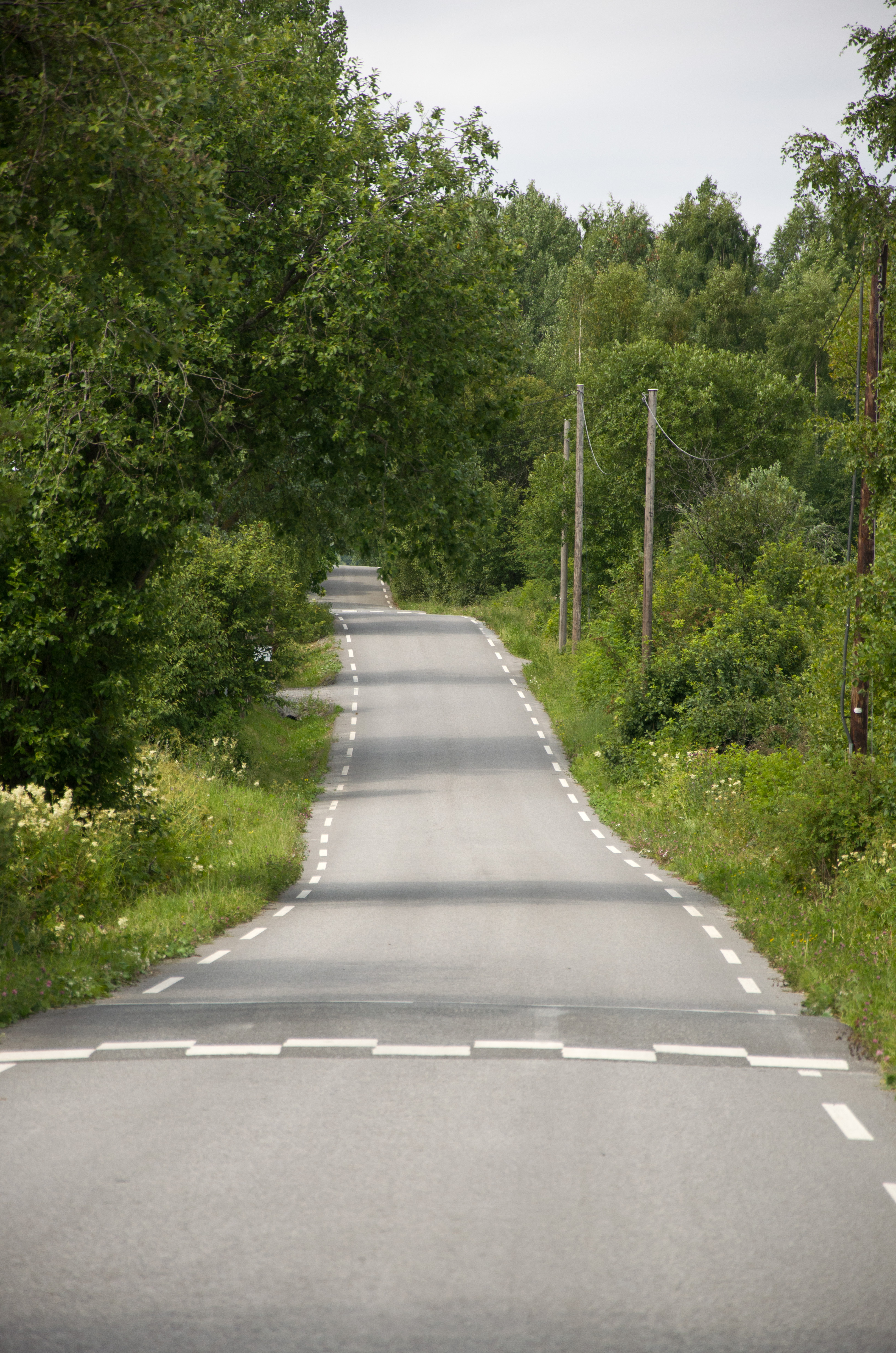 Fylkesvei 1740 (tidl. 71) Benterudbakken